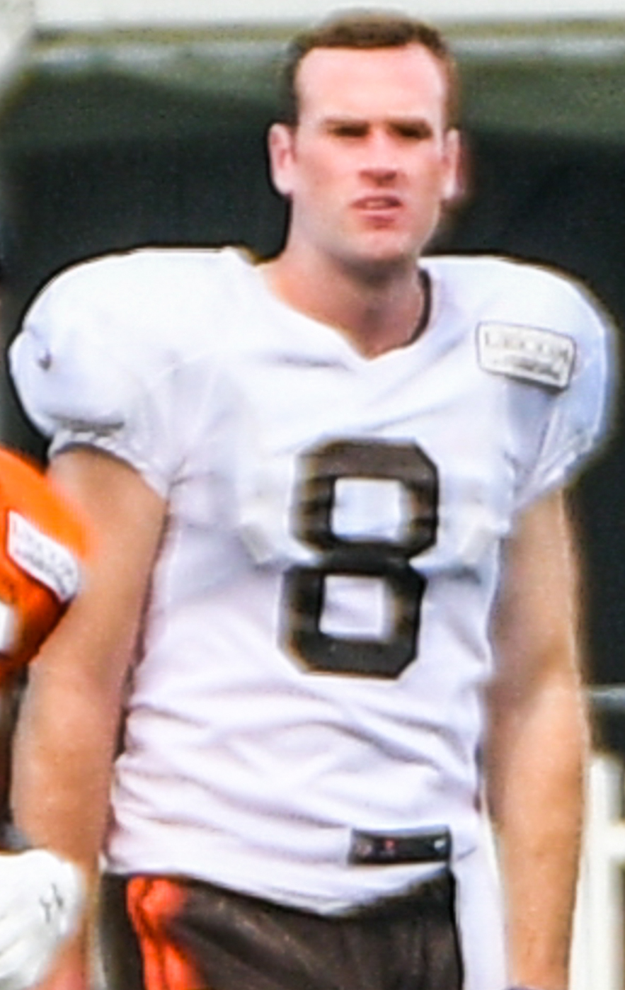 DeShone Kizer